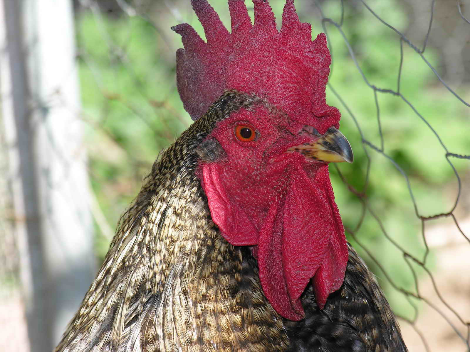 Teaño - Cuntis - Galicia - Spain